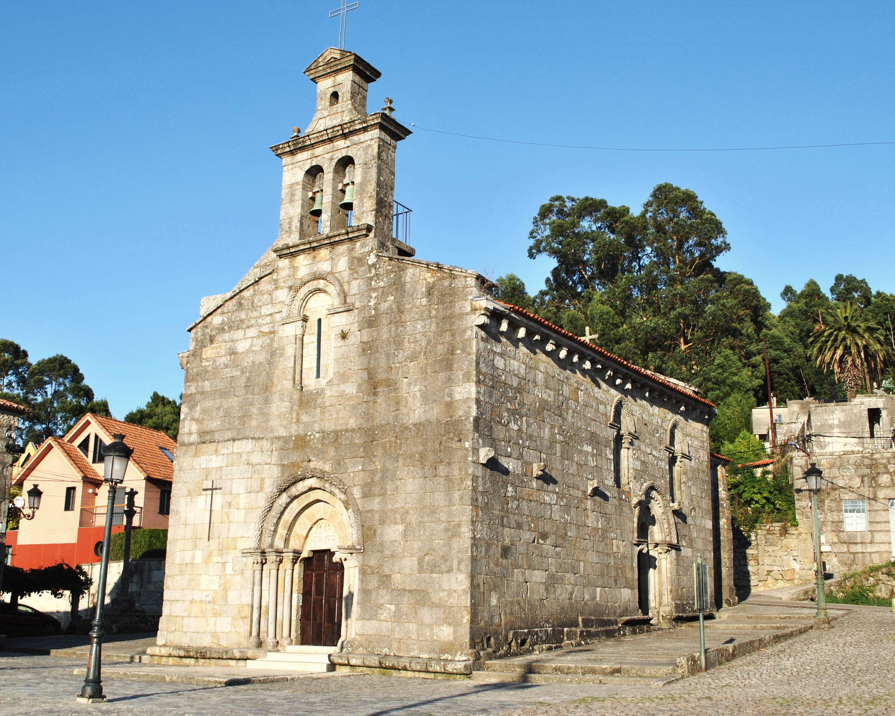 Vexa o título e as categorías.